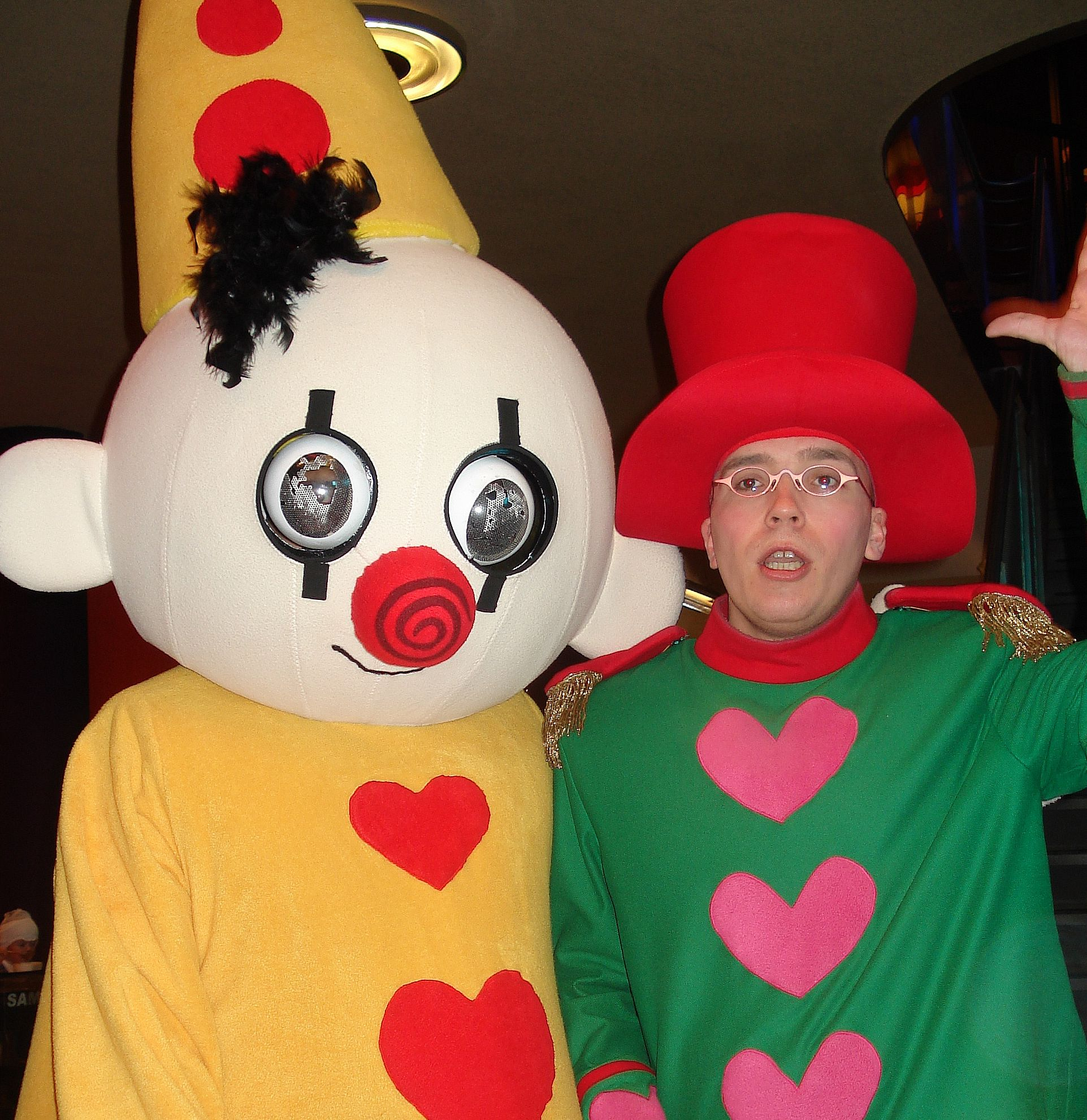 Bumba met zijn circusdirectuer in Plopsa Indoor Hasselt.